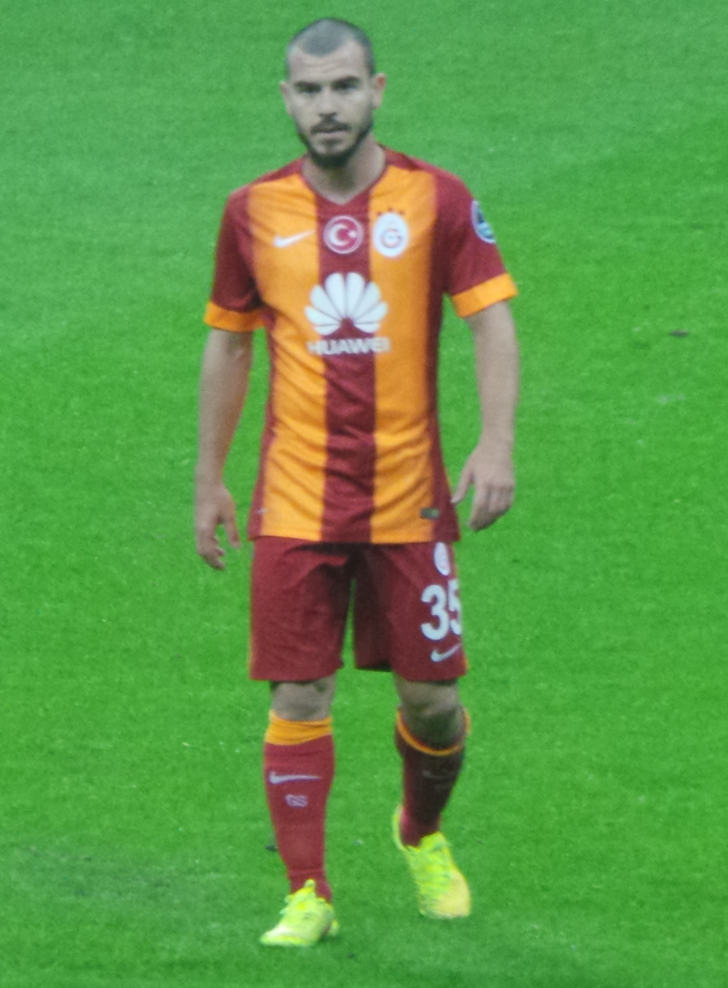 Yekta Kurtuluş'14-15